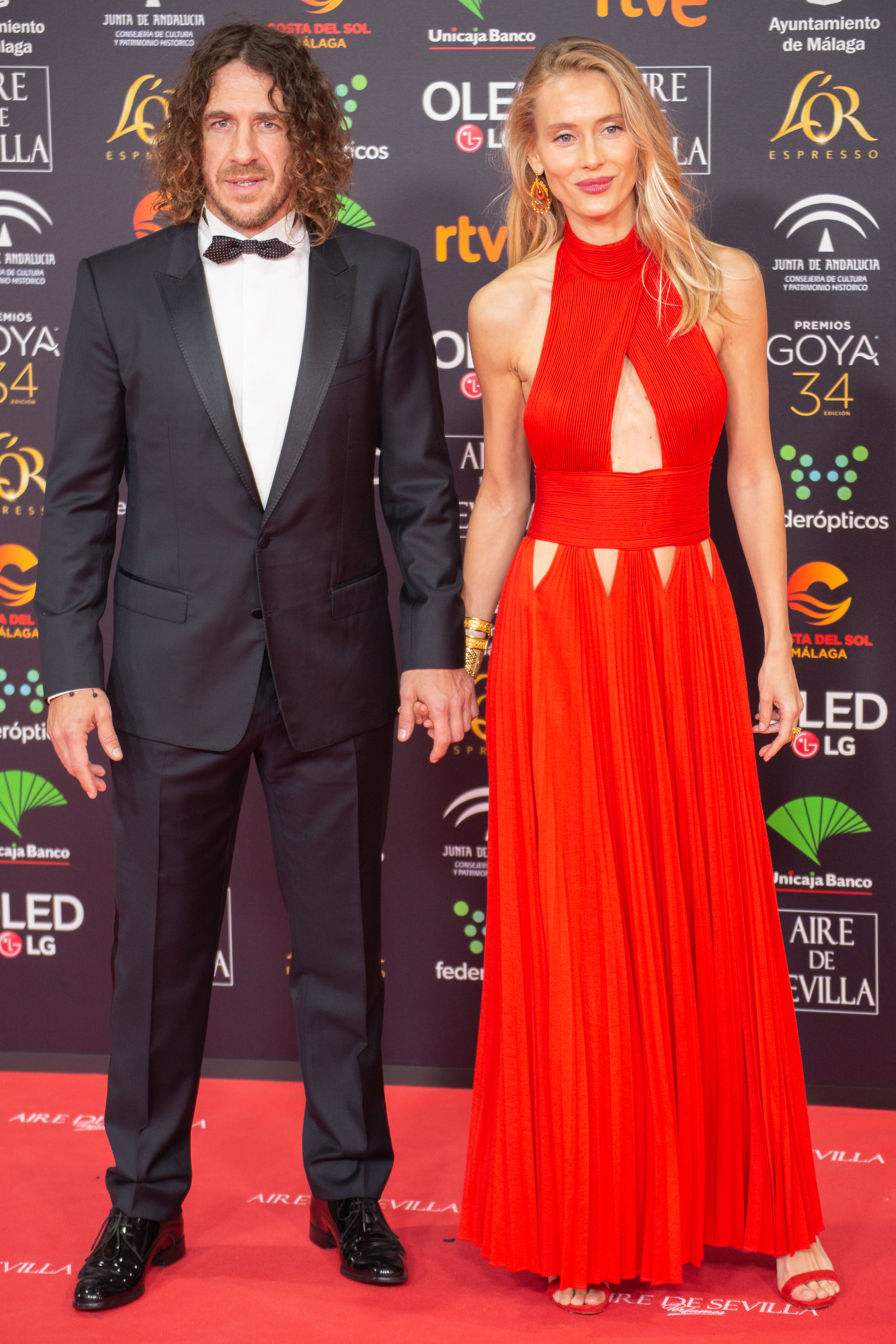 Carles Pujol y Vanesa Lorenzo en la alfombra roja de la ceremonia de entrega de los Premios Goya 2020, celebrados en Málaga